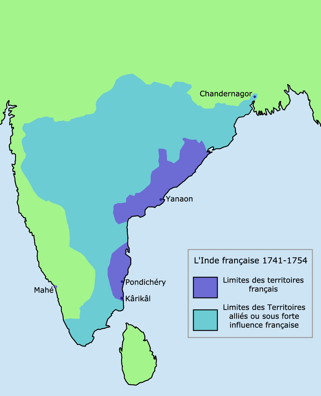 Comptoirs et Territoires français en Inde de 1741 a 1754